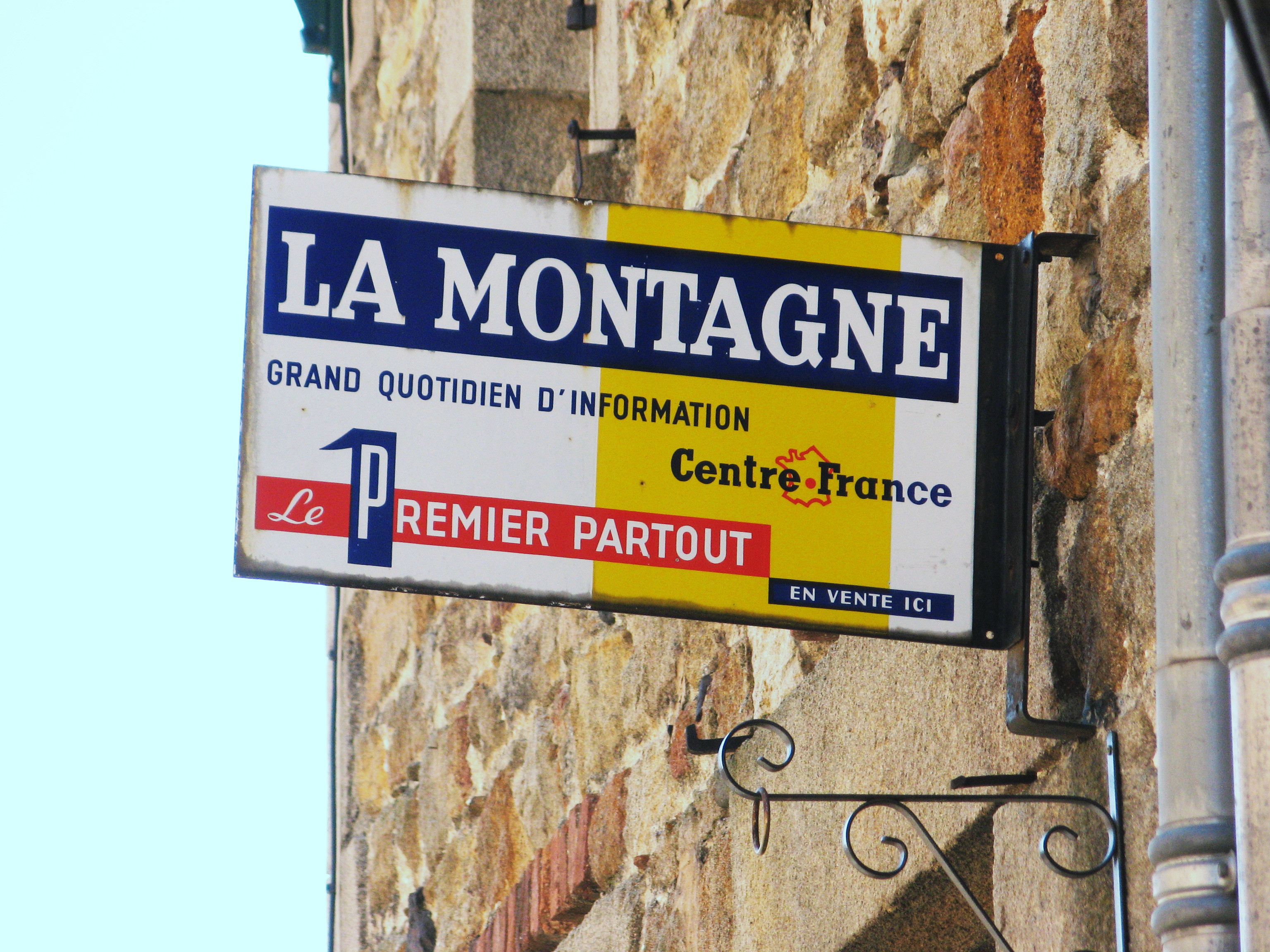 Ancienne enseigne du journal La Montagne à Yronde et Buron.